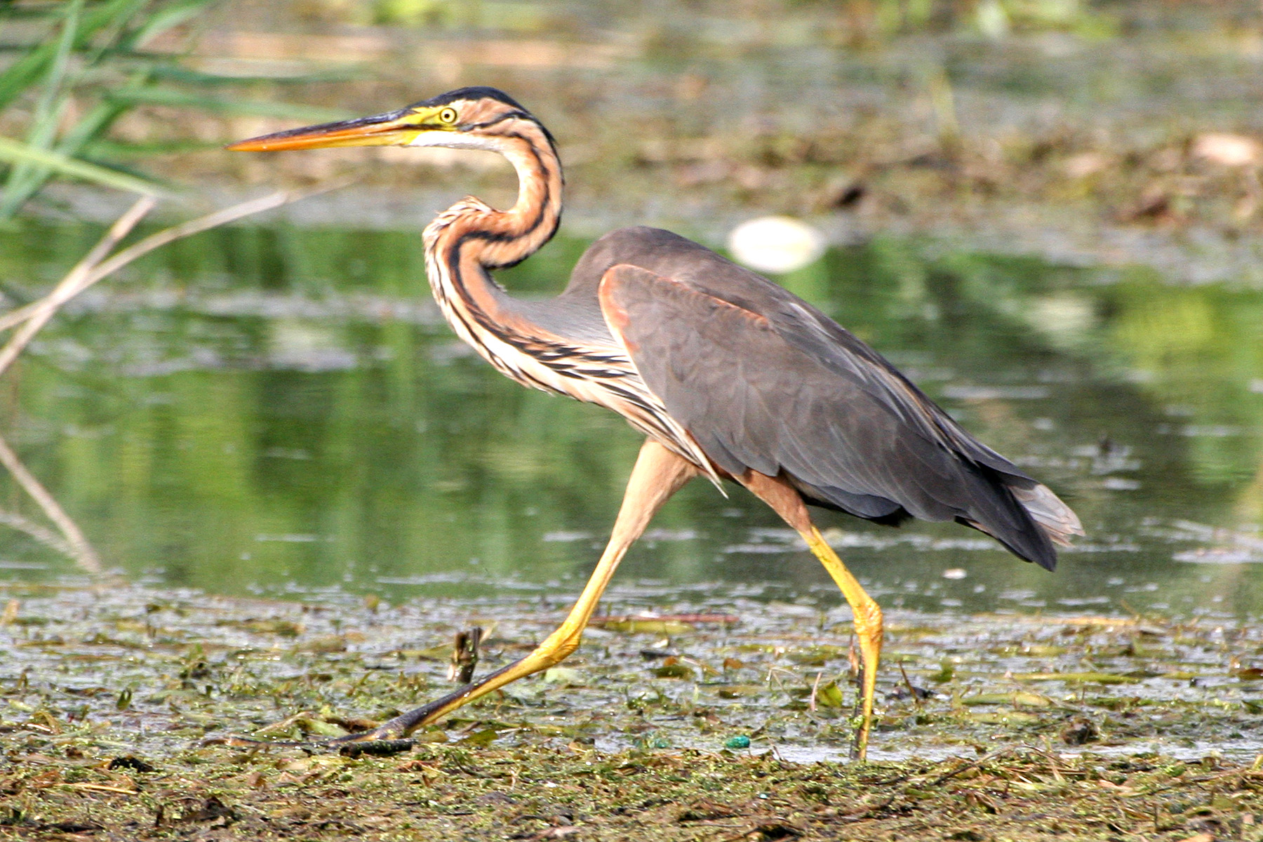 Curtatone (Mn)